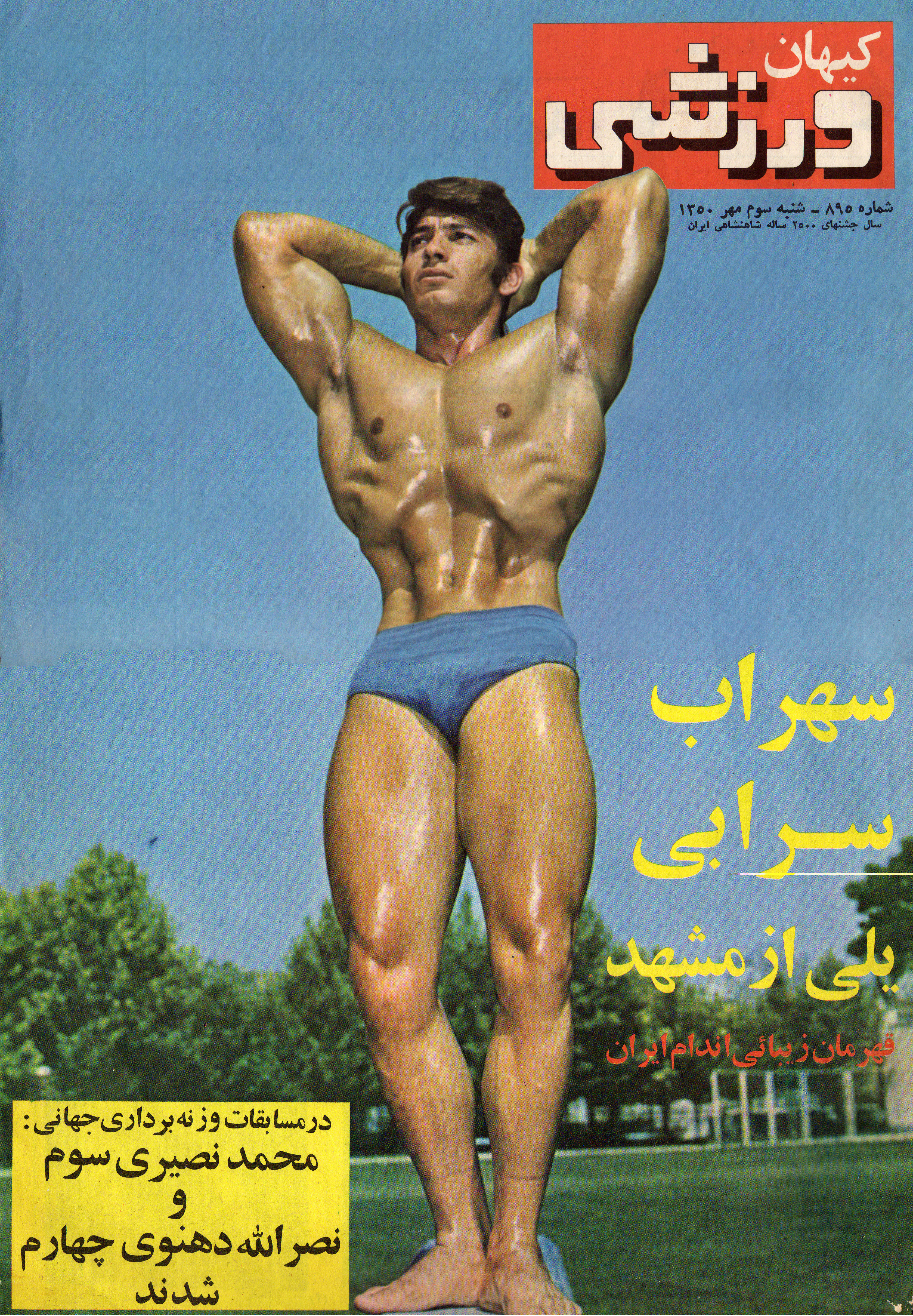 سهراب سرابی بر روی جلد مجلهٔ کیهان ورزشی